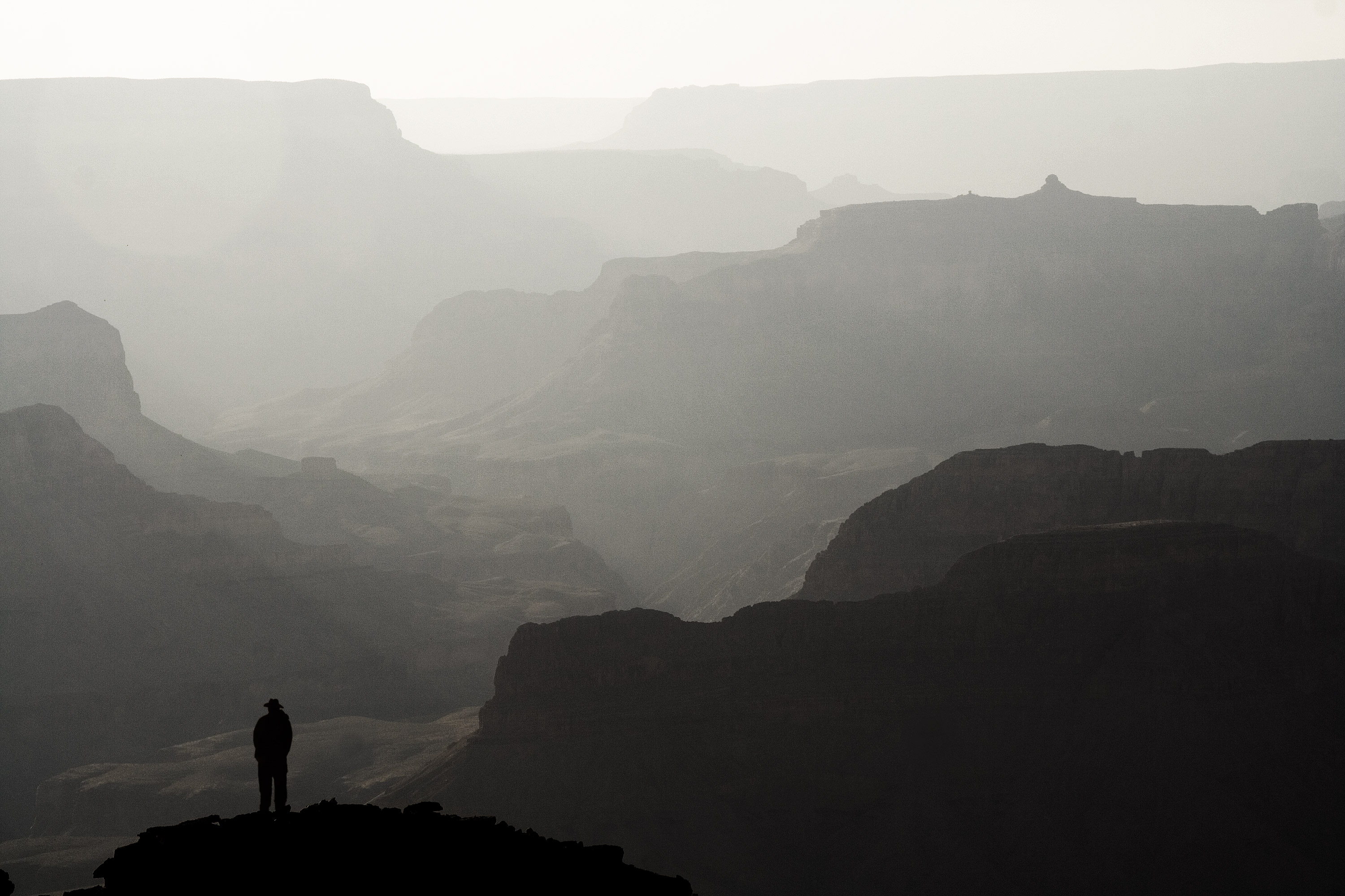 Unterwegs im Grand Canyon